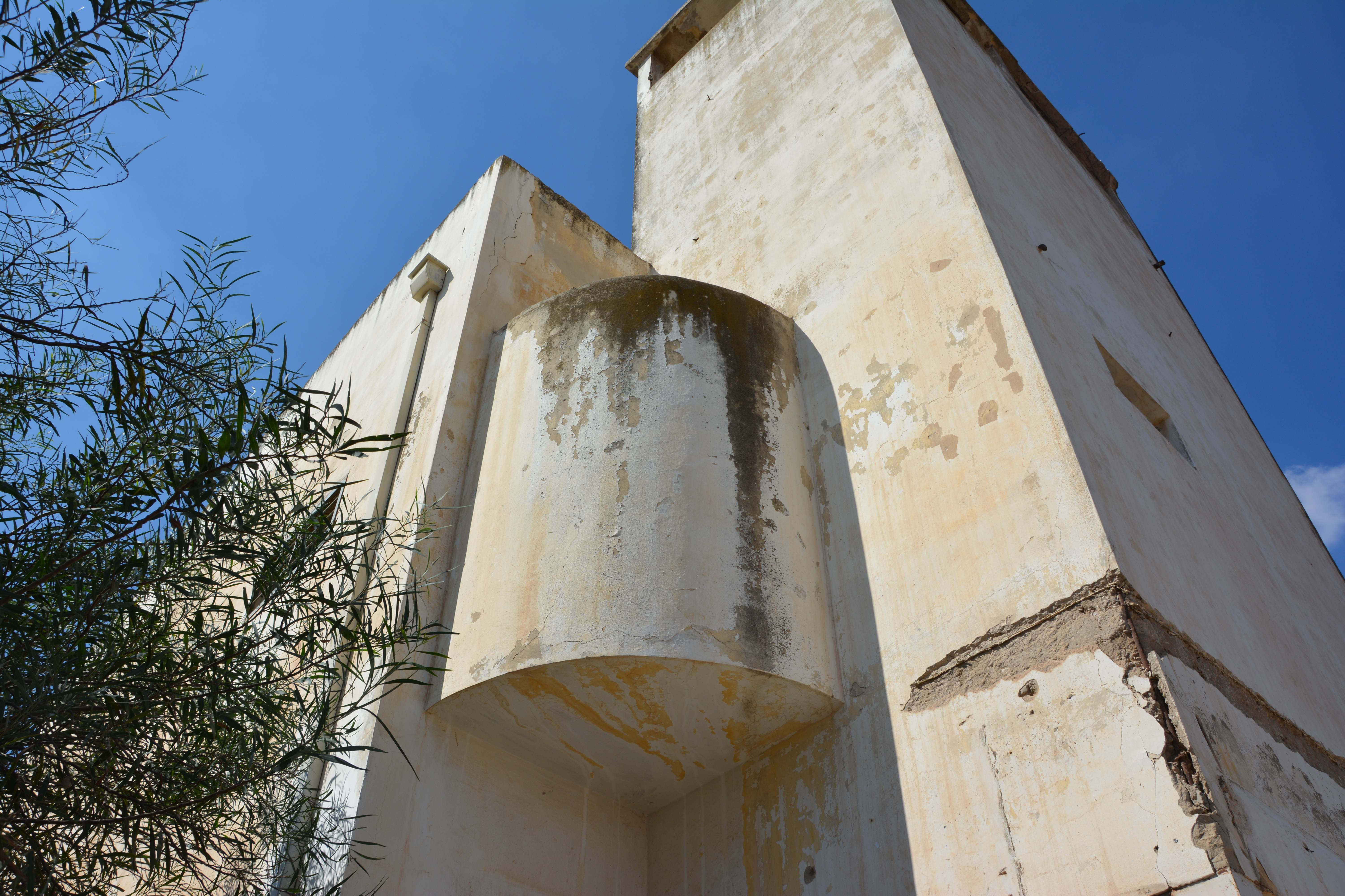 מחנה ישראל (דברת) היה קומונה של פועלי אגודת ישראל שהתארגנה לקראת חיי קיבוץ. אנשי הקבוצה התיישבו על אדמה שנרכשה בשנת 1925 בעמק יזרעאל, ליד קיבוץ דברת של היום.